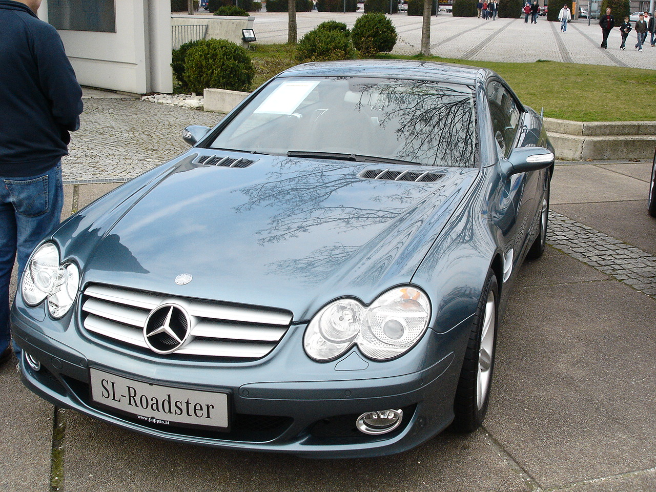 Mercedes SL